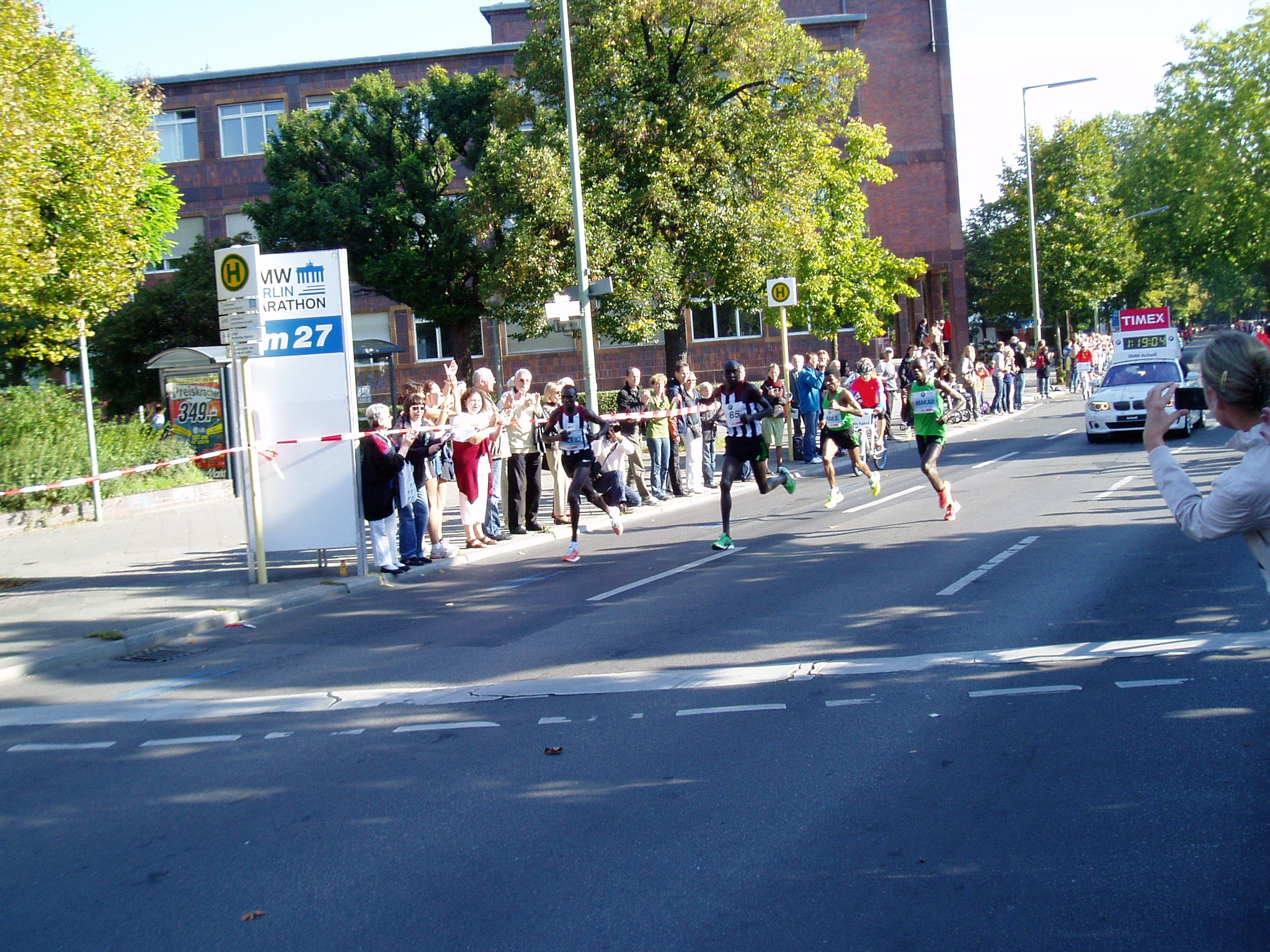 Berlin-Marathon 2011, km 27, Haile Gebrselassie, Patrick Makau Musyoki